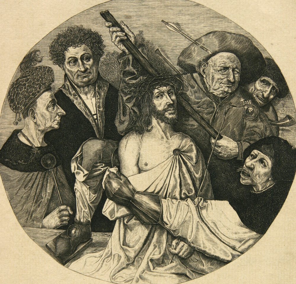 Ecce Homo